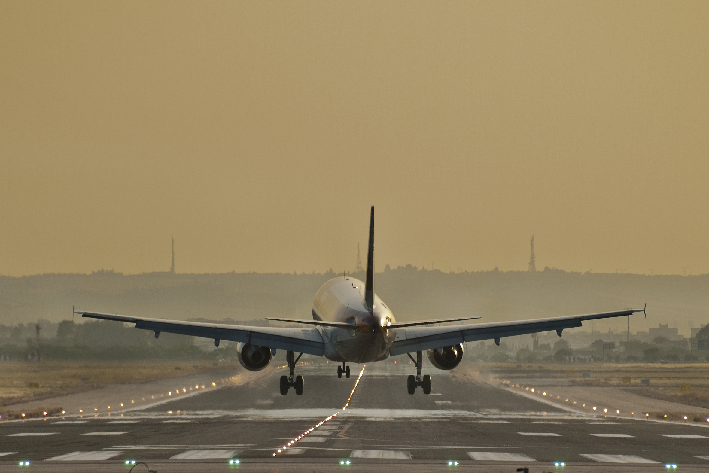 Un poquito de viento cruzado Al little bit of crosswind